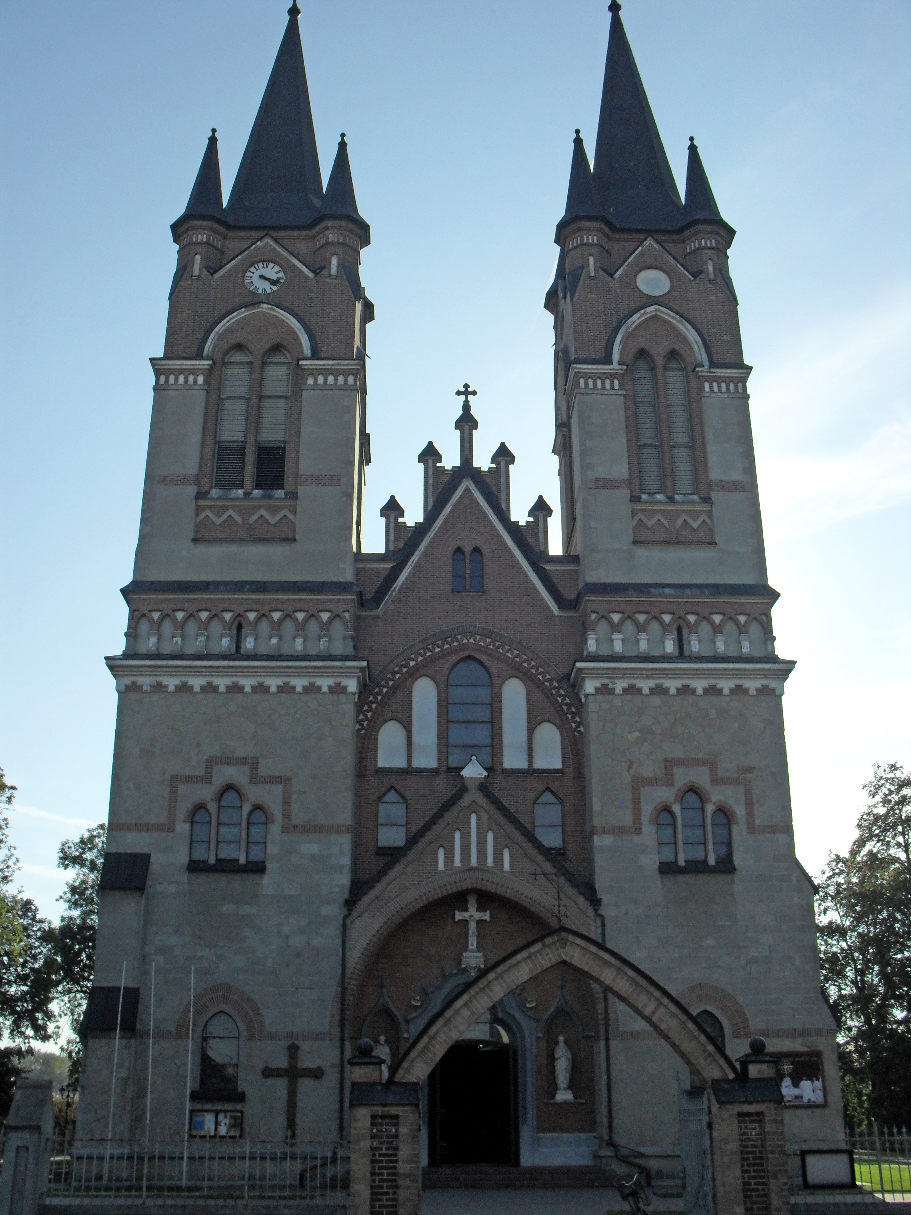 kościół par. p.w. śś. Piotra i Pawła. Zbudowany w 1914r. Zniszczony podczas I wojny światowej, został odbudowany w latach 1921-1928. Otfinów, Żabno